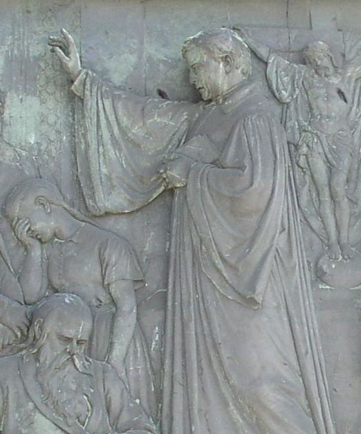 Prediger Hoffmann tröstet die Familien der Soldaten. Detail aus dem Relief 1864 von Alexander Calandrelli an der Berliner Siegessäule